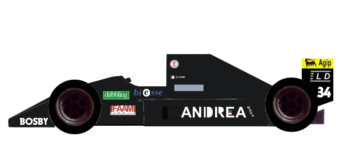 Coloni C4B-Judd; Lackierung vom Großen Preis von Südafrika 1992